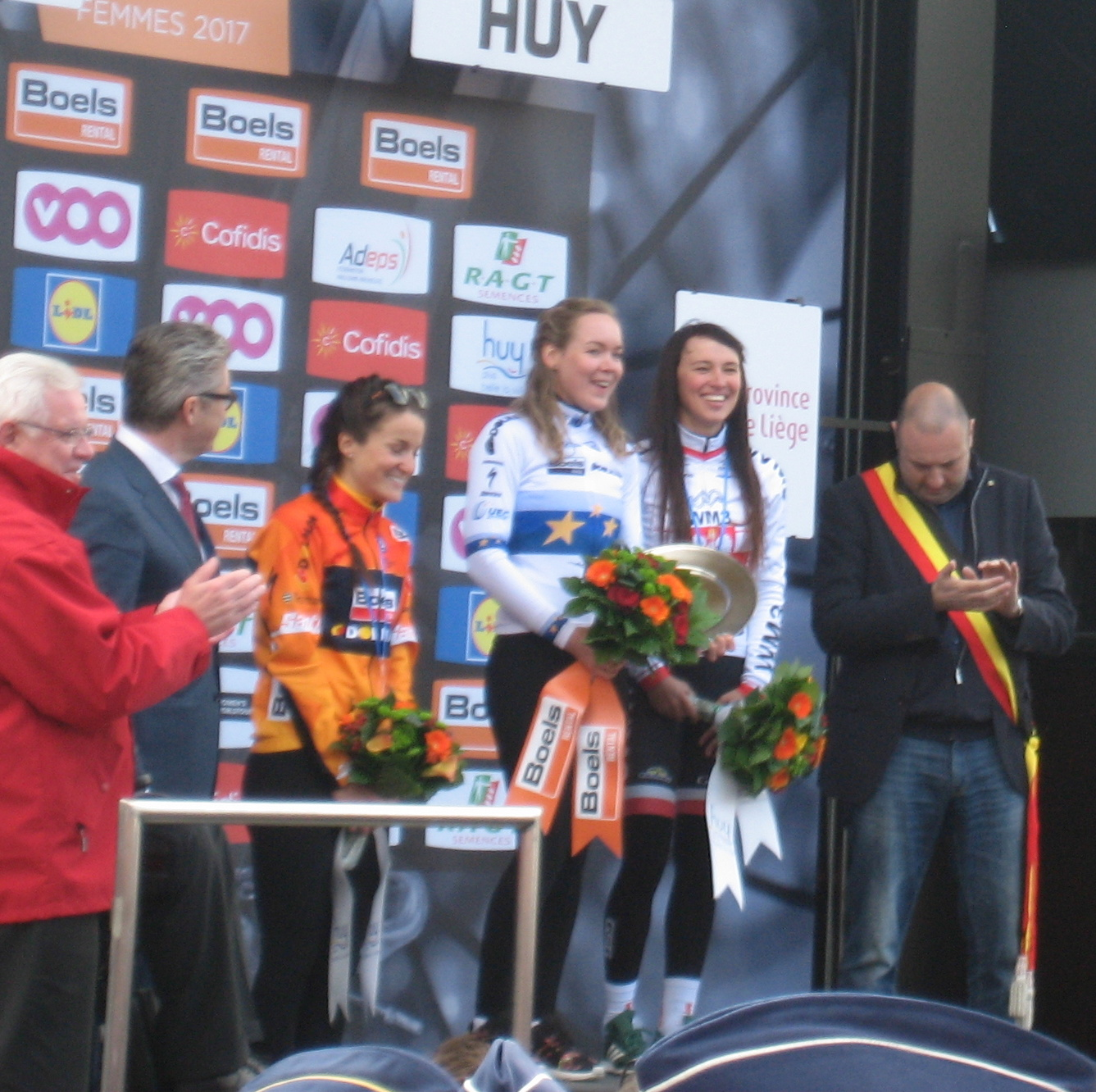 Podium van de Waalse Pijl 2017. 1. Anna van der Breggen 2. Lizzie Deignan 3. Kasia Niewiadoma